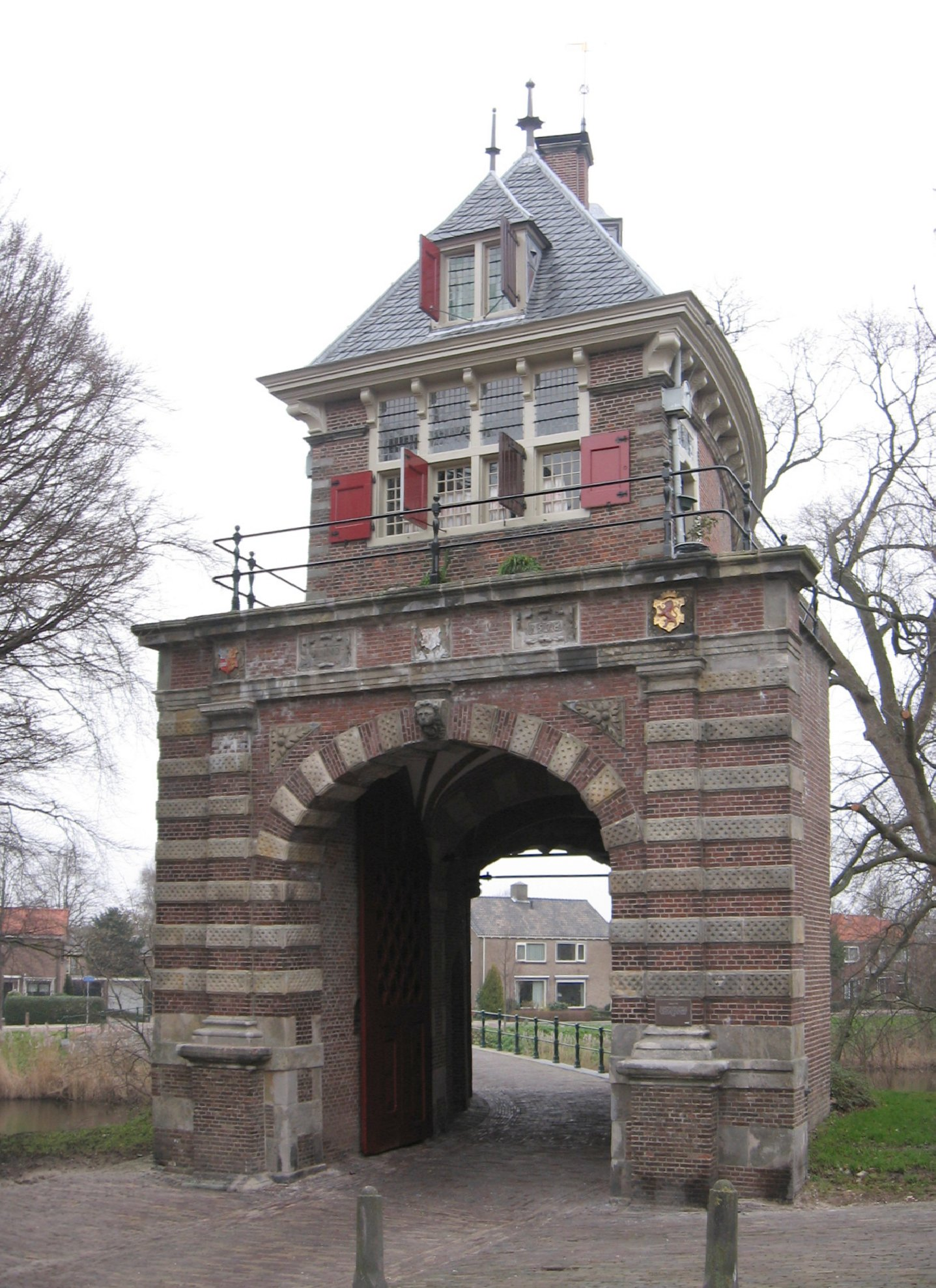 Oosterpoort, Hoorn (Noord-Holland). Kopie van nl::Afbeelding:Hoorn Oosterpoort 008.jpg, bewerkt. Author: M.Minderhoud; licentie: PD. Oosterpoort